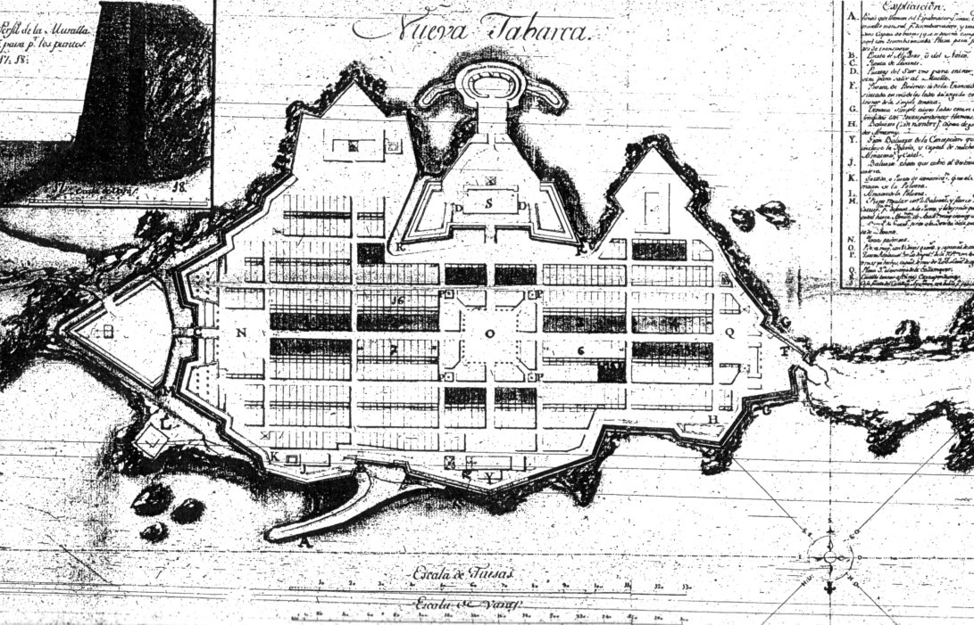 Plànol original de Tabarca, que no s'arribà a realitzar.